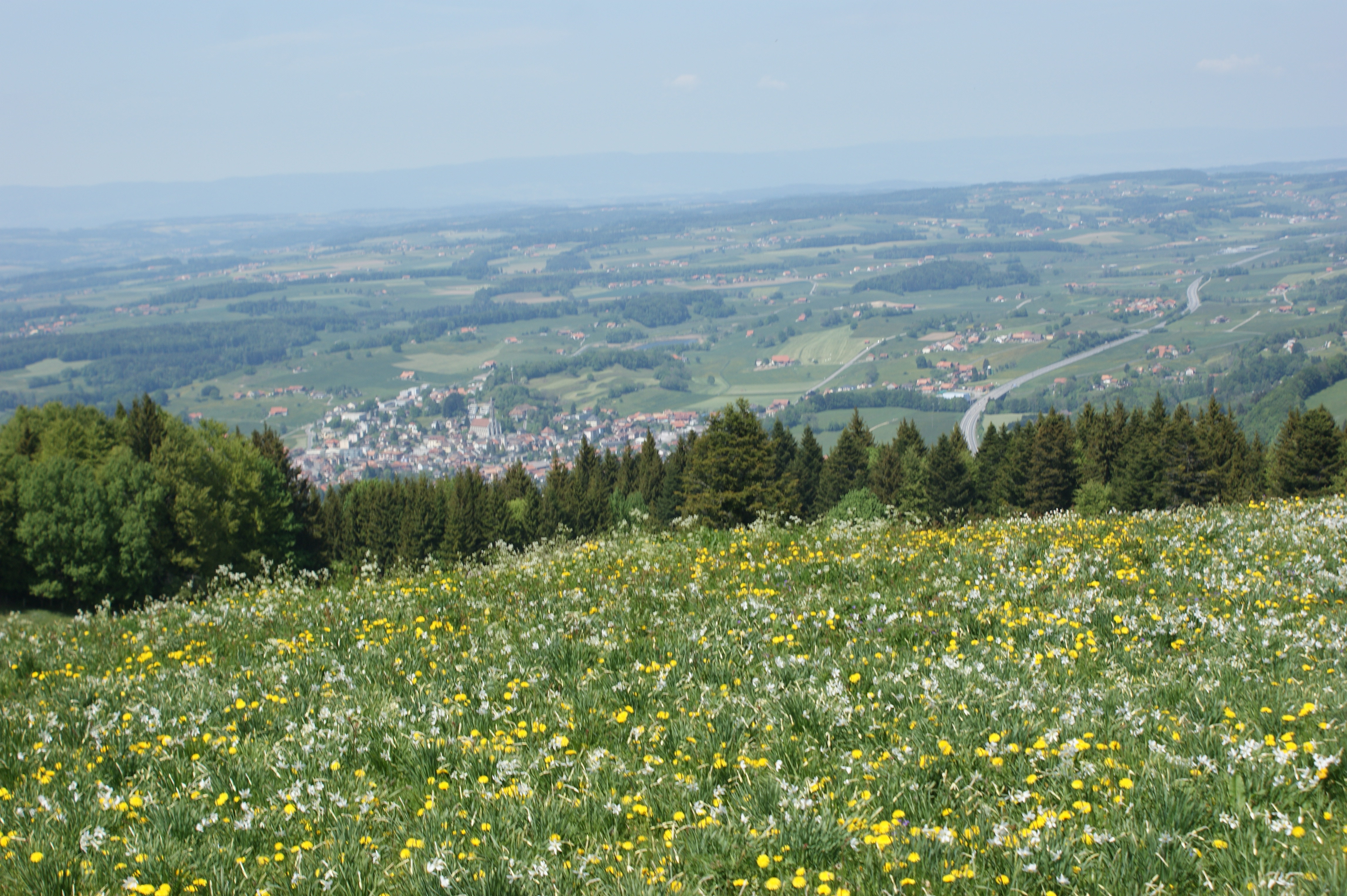 Châtel-Saint-Denis von Les Pléiades aus gesehen